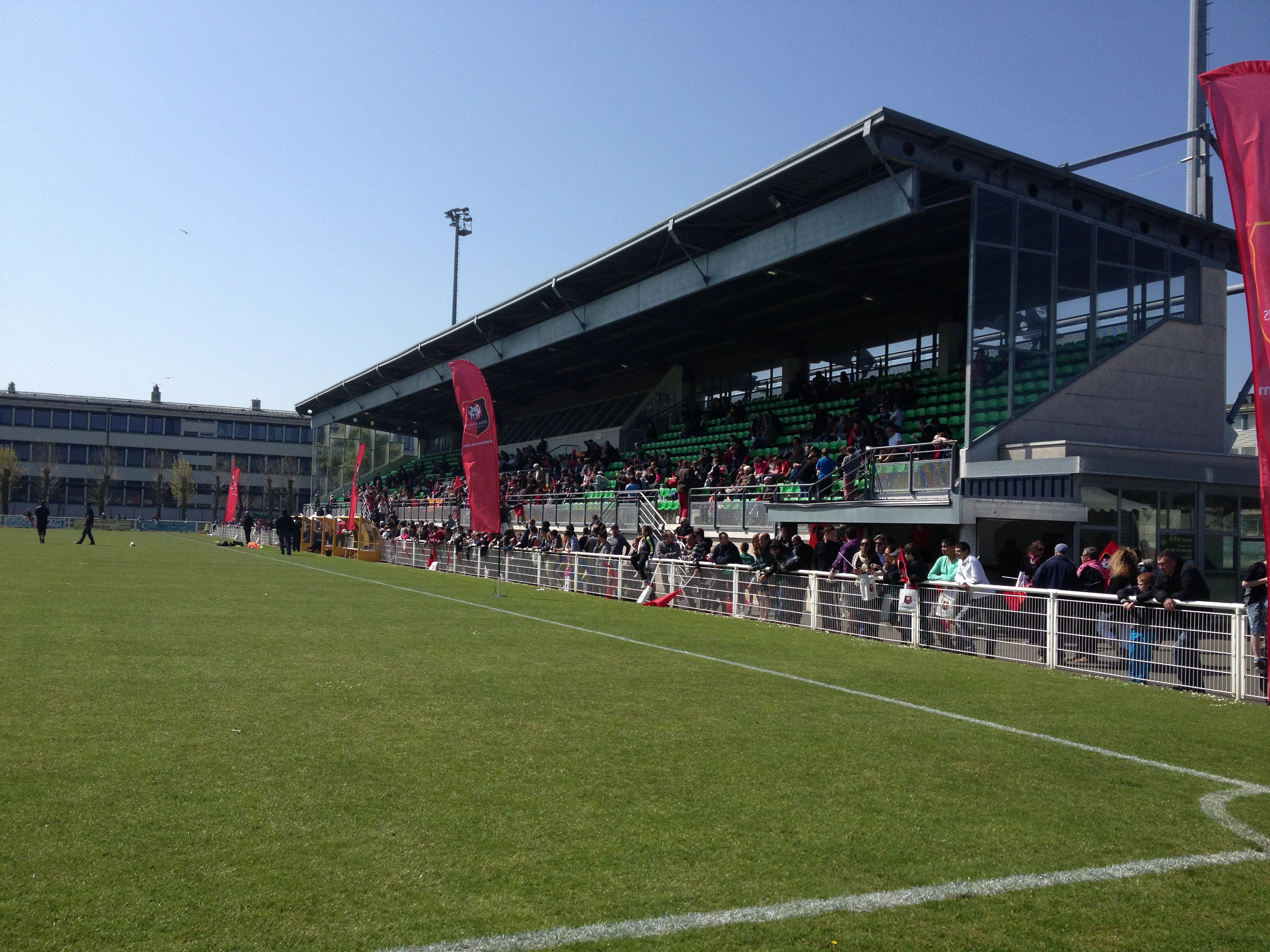 Photo prise lors d'un entraînement du Stade rennais au stade de Marville de Saint-Malo le 3 mai 2013. Ici, la tribune du stade.